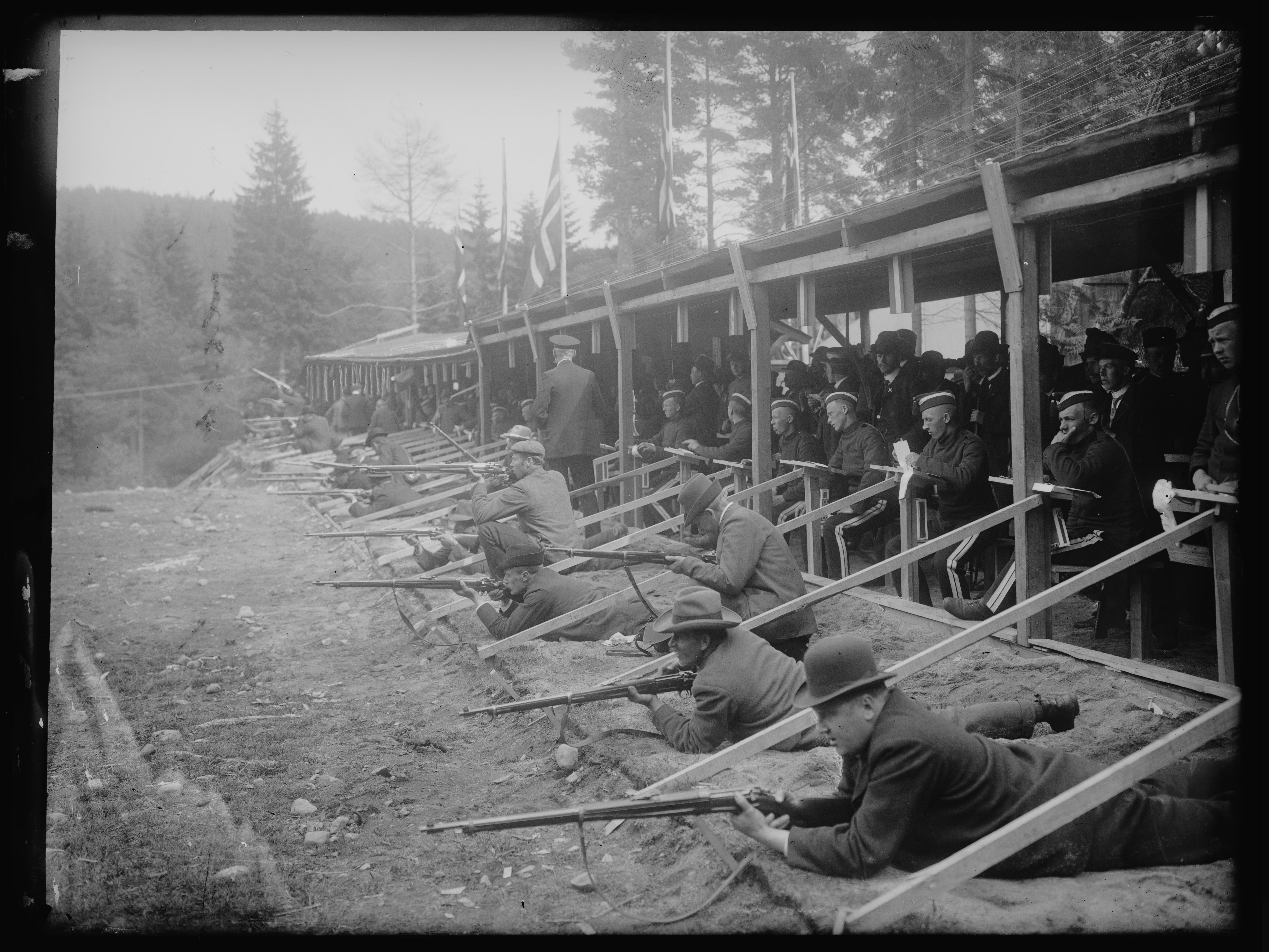 Bildet er hentet fra Nasjonalbibliotekets bildesamling. Anmerkninger til bildet var: Påskrift arkivark: Landsskytterfesten 1907 Eldste arkivnummer: 1027 (1021?) Nyere arkivnummer: 222, 398 Oslo, Oslo